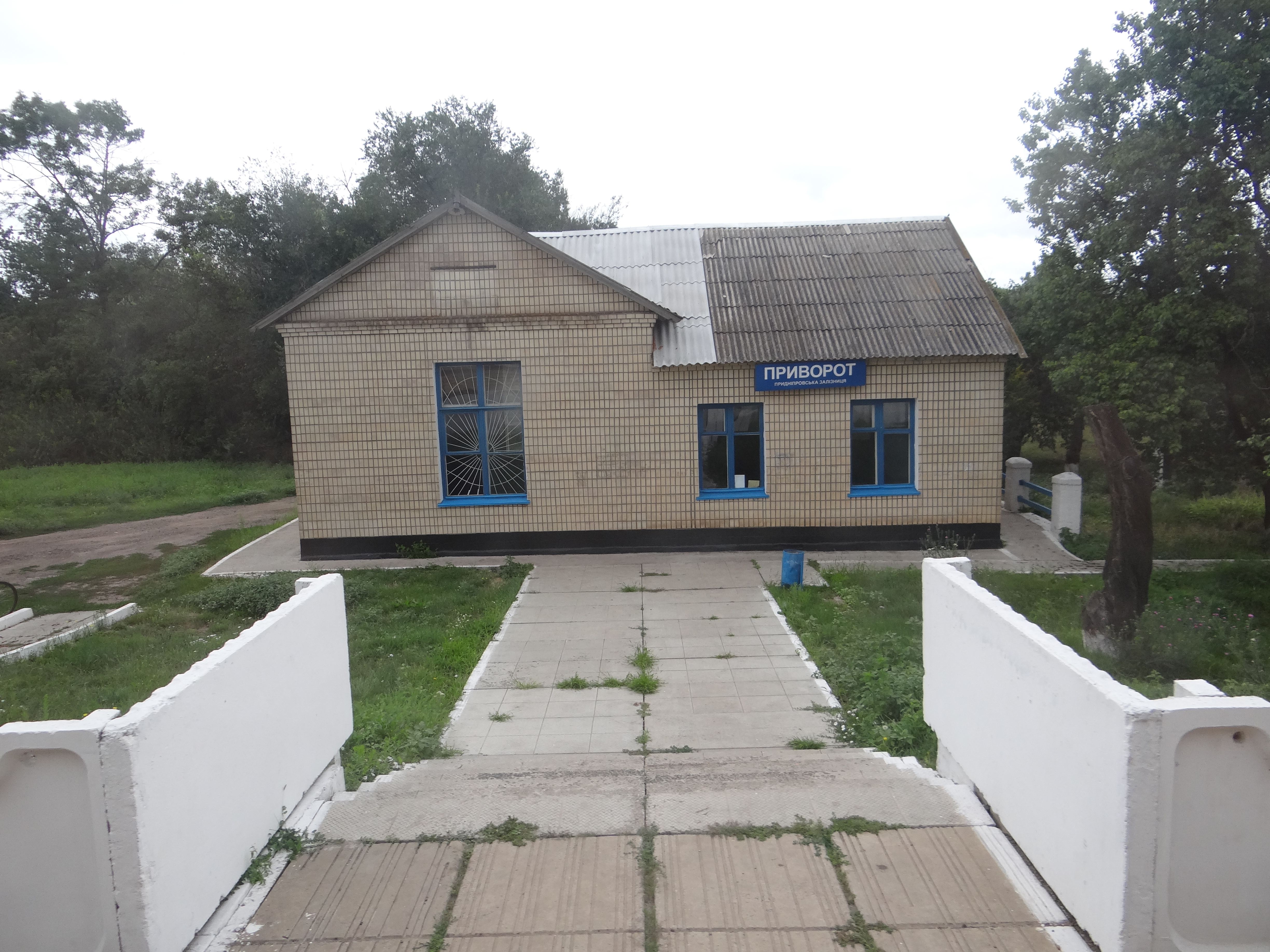 Приворот